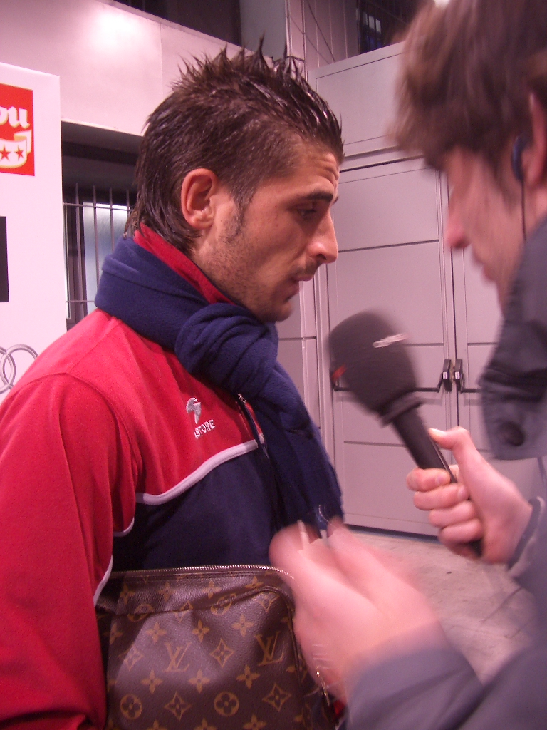 Javier Portillo regresó al Bernabeu sin cláusulas de contrato que no le permitieran jugar contra el Real Madrid. Y es que su ex-equipo ha dejado marchar a muchos de sus jugadores de la cantera a otros clubes con la condición de que estos no jueguen contra el equipo que les formó. No es el caso de Portillo,jugador fichado por el Osasuna. Una pena que no contara con su oportunidad en el Real